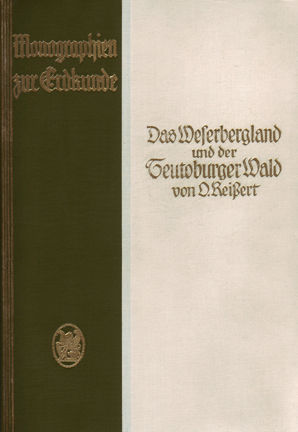 Vordereinband (Cover) des Buchs „Das Weserbergland und der Teutoburger Wald“ von Oswald Reißert.